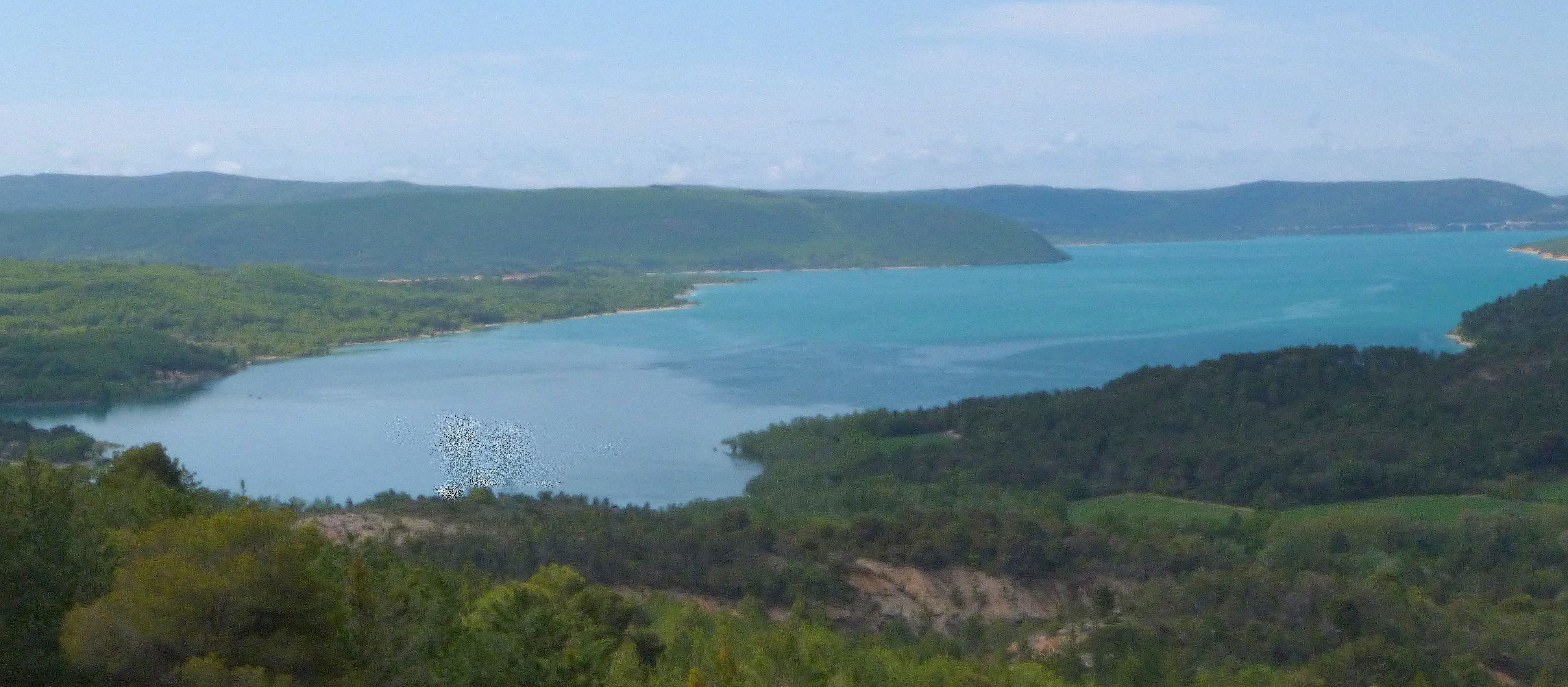 Lac de St. Croix